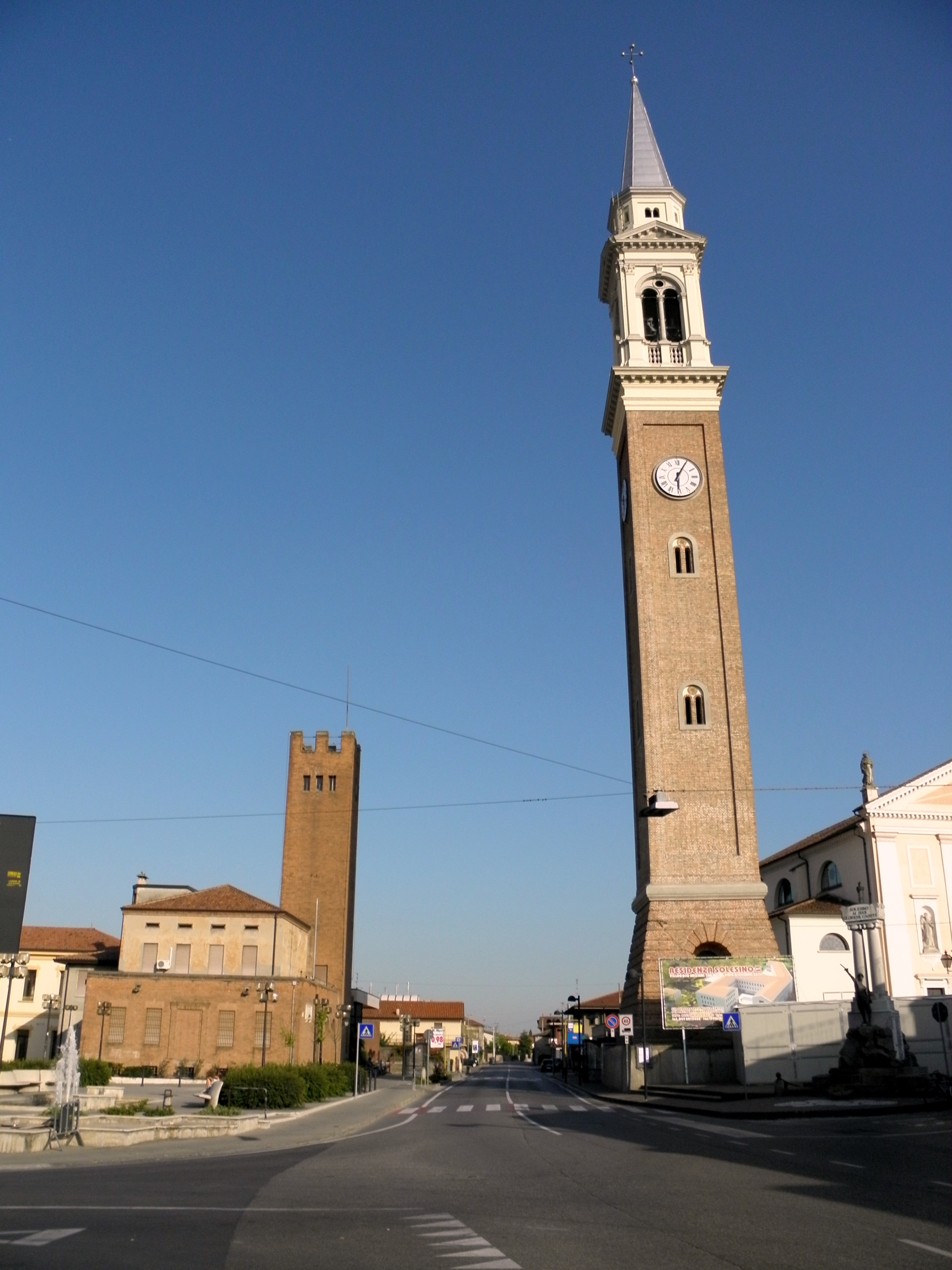 Solesino: vista di Via 28 Aprile con il Palazzo comunale, sulla sinistra, e la chiesa parrocchiale ed arcipretale di Santa Maria Assunta, sulla destra.